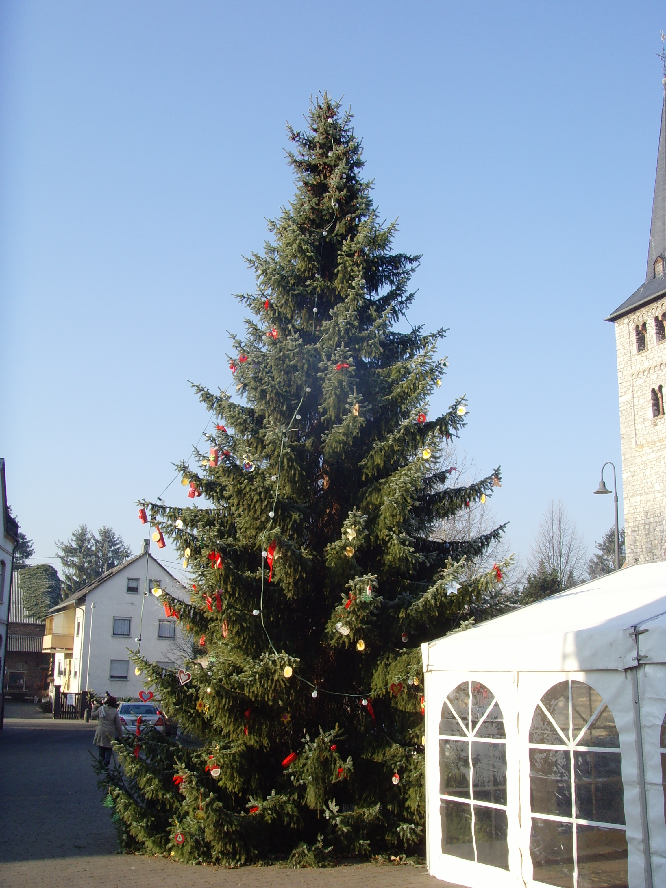 Weihnachtsbaum vor der Kirche in Offheim, selbst fotografiert